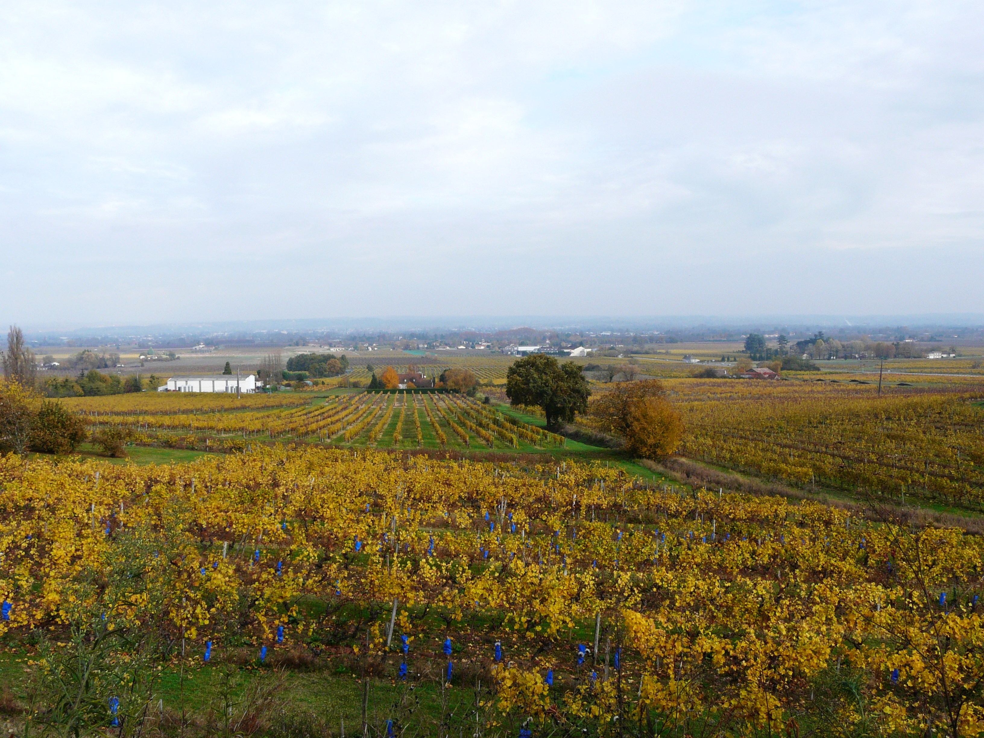 Le vignoble de Monbazillac : au premier plan, commune de Monbazillac, au second plan Saint-Laurent-des-Vignes, au loin Bergerac. Dordogne, France